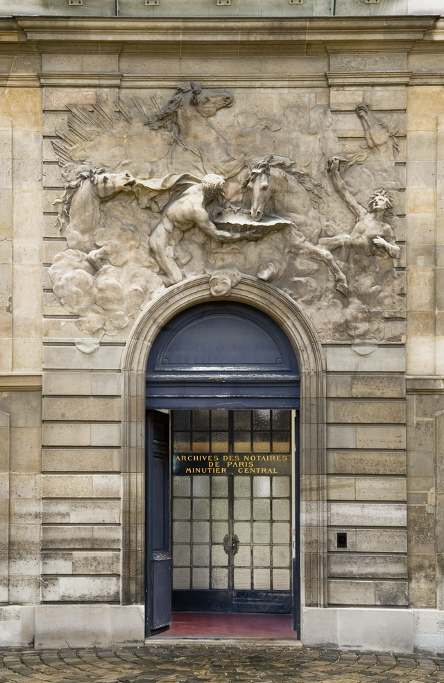 Vue du chef-d'oeuvre de Robert Le Lorrain, Les Serviteurs d'Apollon donnant à boire aux chevaux du char solaire, dit Les Chevaux du Soleil (1737), et de l'entrée des magasins du Minutier central des notaires de Paris, installé dans les anciennes écuries de l'hôtel de Rohan à Paris.